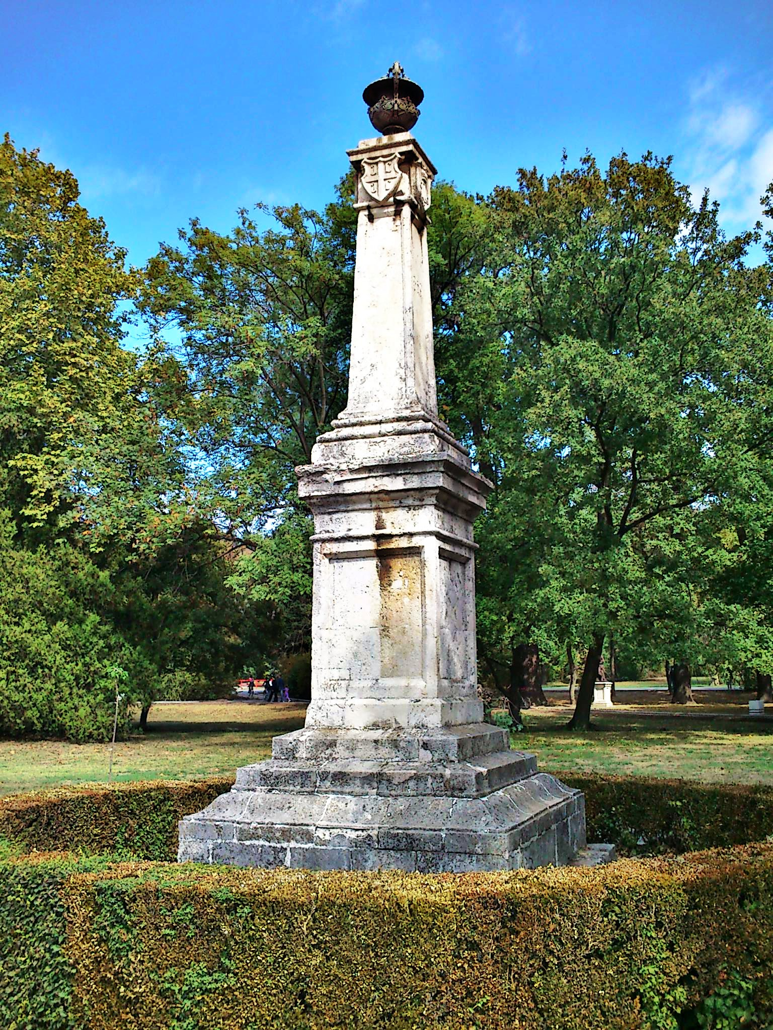 Обелиск у Топчидерском парку